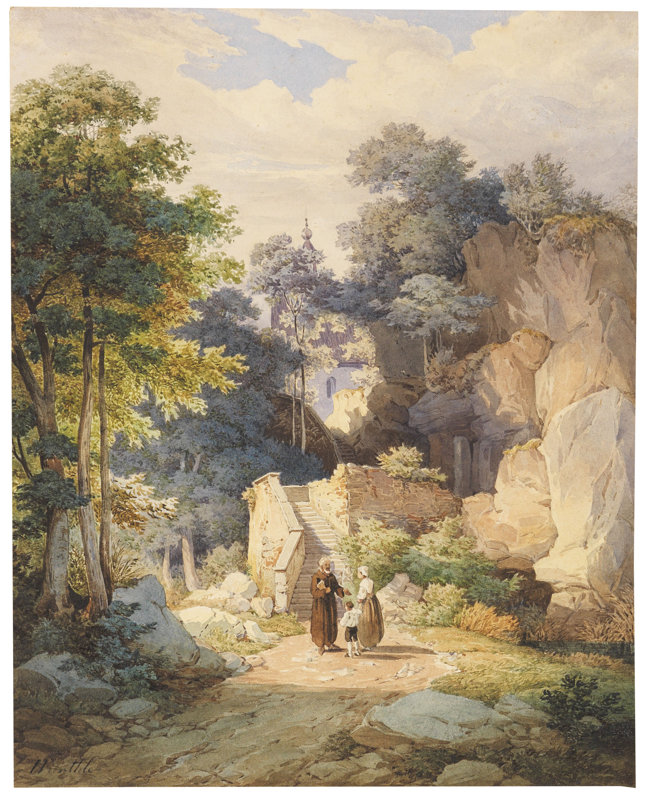 An der Treppe zur Wallfahrtskirche St. Magdalena auf der Biber bei Brannenburg. Ende 19. Jahrhundert. Aquarell über Bleistift. Links unten signiert. 25,4 x 20,3 cm. Provenienz: Sammlung der Markgrafen und Großherzöge von Baden (verso auf der Rahmenrückwand mit Inventar-Etikett vom Schloss Karlsruhe sowie Messingschildchen mit Nr. "564"). Sotheby's, Auktion Die Sammlung der Markgrafen und Großherzöge von Baden, 5. - 21. Oktober 1995, Lot 4382 (verso auf der Rahmenrückwand mit dem Etikett).